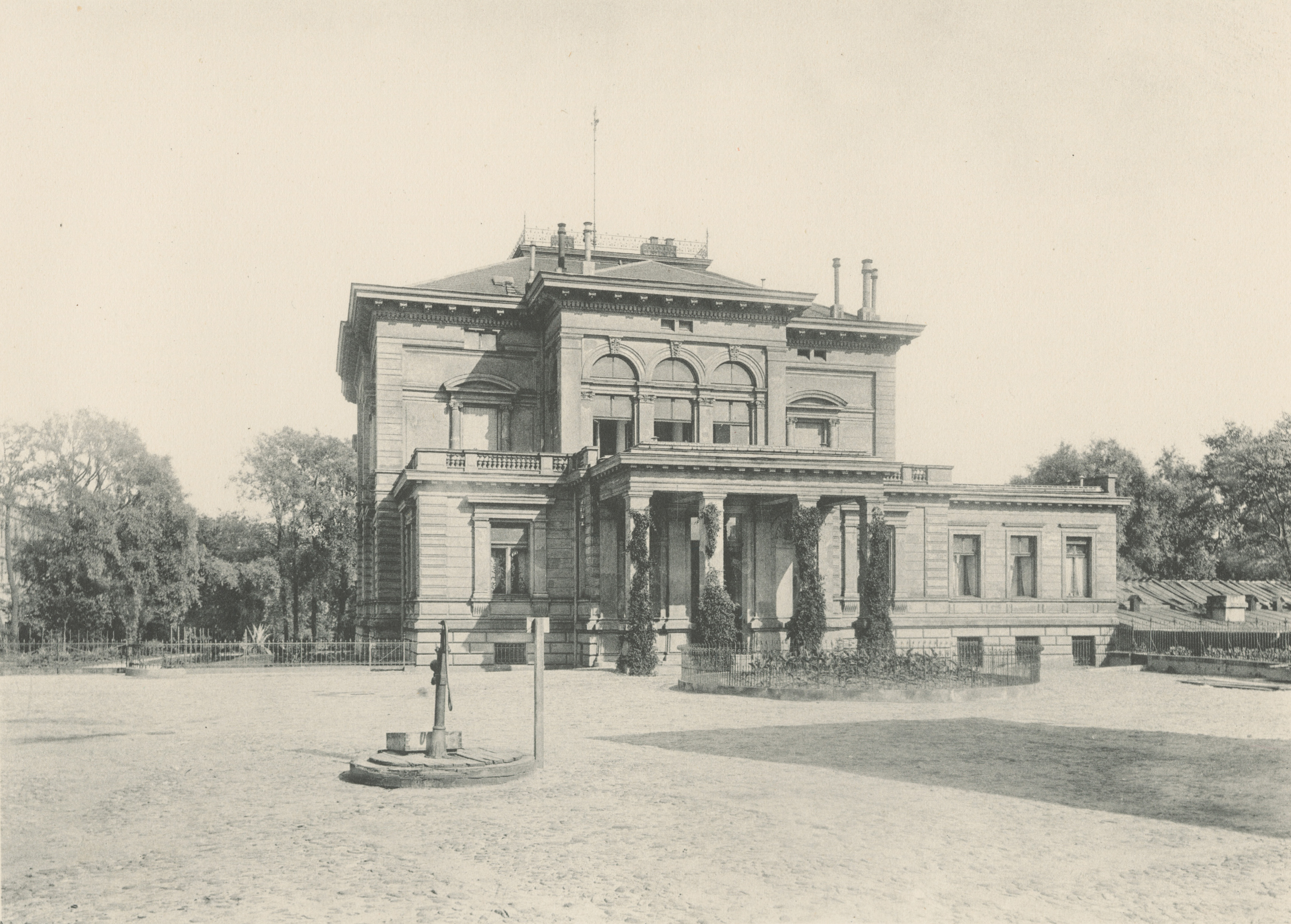 Fotografia przedstawia willę Ludwika Grohmana znajdująca się przy ulicy Tylnej 9/11. Wybudowana w latach 80. XIX wieku według projektu Hilarego Majewskiego, stylem nawiązuje do renesansu włoskiego. W latach 1894-1896 została dobudowana od strony wschodniej nowa część z paradną klatką schodową oraz zimowy ogród. W 1913 roku rozbudowano część południowo-wschodnią, dobudowując piętrowy aneks z osobnym wejściem. Główne wejście z portykiem filarowym prowadziło do reprezentacyjnego hallu i klatki schodowej. Na parterze znajdowały się pomieszczenia zarówno reprezentacyjne jak i mieszkalne. W pałacu umieszczono cztery windy - jedną osobową i trzy gospodarcze. W 1945 roku budynek zajęło NKWD, które rozkradło praktycznie całe wyposażenie. Następnie willa przeszła na własność Zakładów Przemysłu Bawełnianego "Uniontex", które umieściły tu zakładowe przedszkole. Na początku lat 90. XX wieku budynek przejęła gmina, która w 1998 roku sprzedała go w ręce prywatne. Fotografia pochodzi z wydanego w 1896 roku albumu Bronisława Wilkoszewskiego „Widoki m. Łodzi”. Saryusz Bronisław Paweł Wilkoszewski (1847-1901), zwany "łódzkim Canaletto" był mistrzem fotografii ilustracyjnej. Udokumentował zabudowę Łodzi z końca XIX wieku przede wszystkim wille, fabryki, budynki użyteczności publicznej, obiekty sakralne, ulicę Piotrkowską. Jego zakład fotograficzny znajdował się w willi "Trianon" w Pasażu Meyera 5 (obecnie ulica Moniuszki).